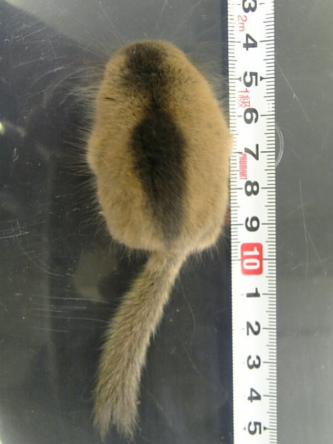 ヤマネの全長の一例